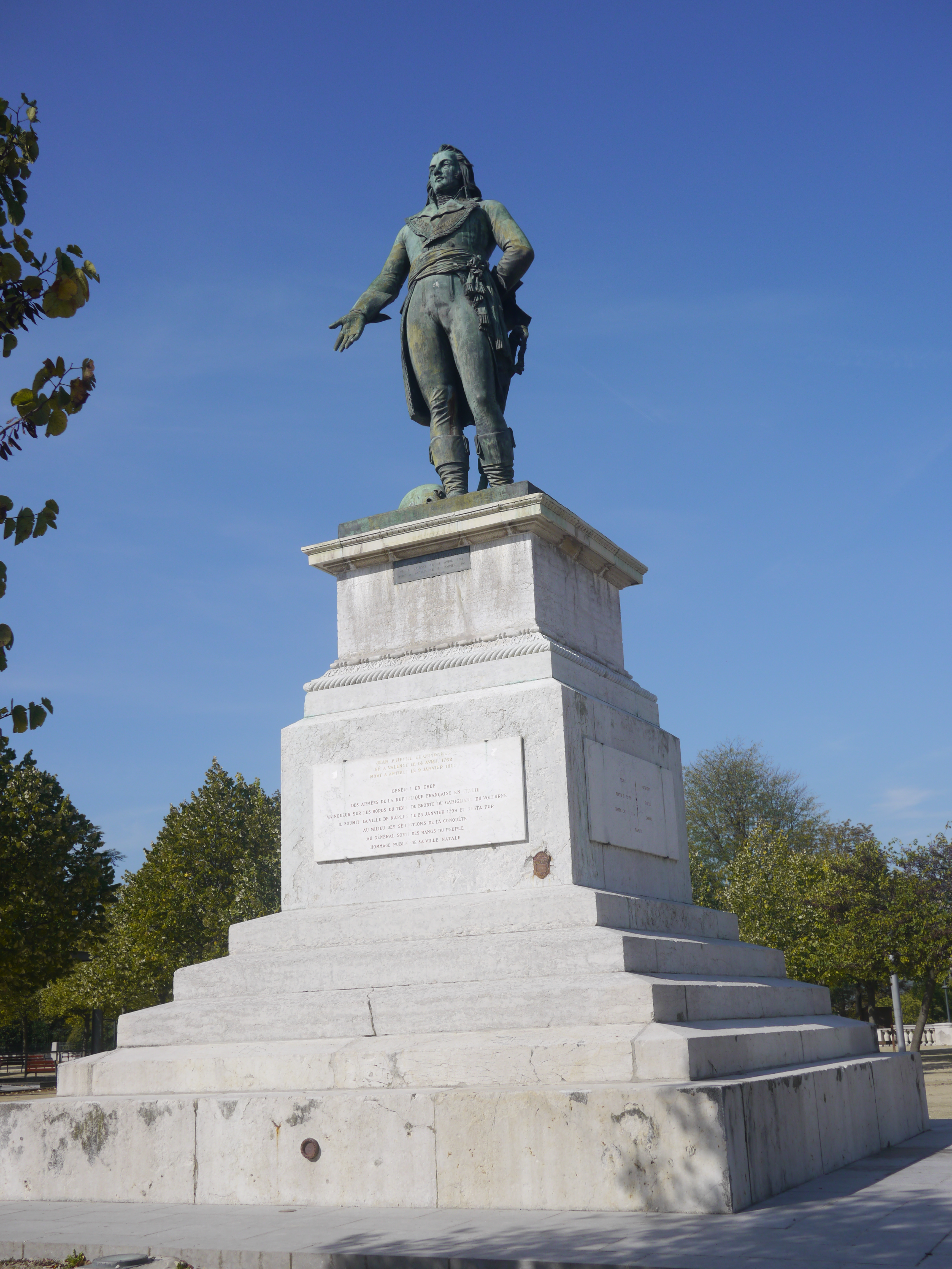 Statue de Jean-Étienne Championnet à Valence.